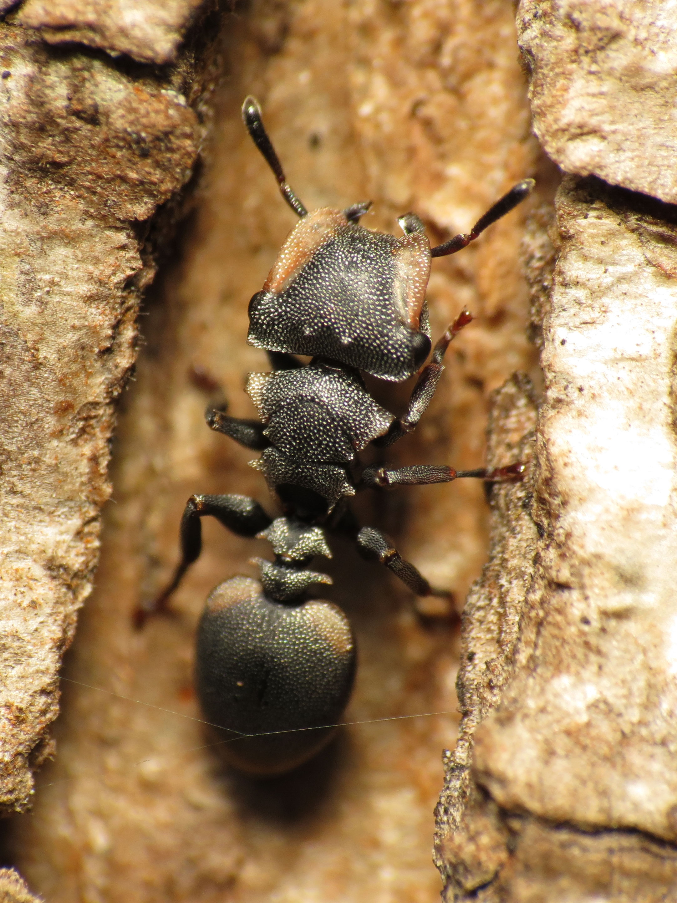 Cephalotes multispinosus. Sitio arqueológico Uxmal, Yucatán, México.